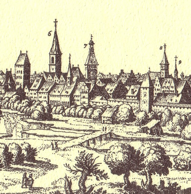 Das Altpörtel (Nr. 7) auf dem Stich von Matthäus Merian (1640)